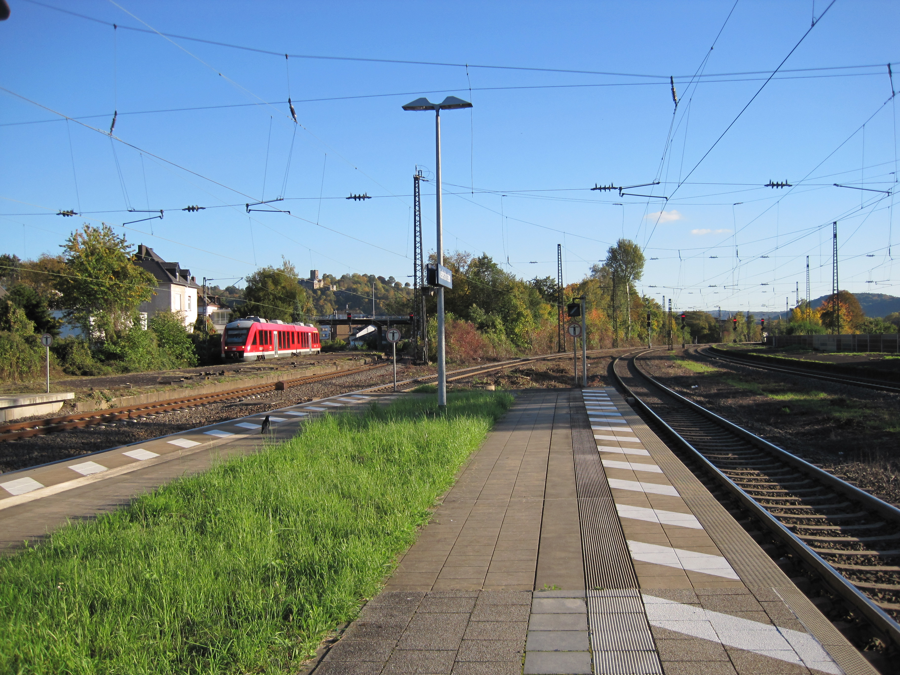 Bahnhof Niederlahnstein, Rhein-Lahn-Kreis, Rheinland-Pfalz. Hier: Trennung von Lahntalbahn (linker Abzweig) und Rechter Rheinstrecke (rechter Abzweig).